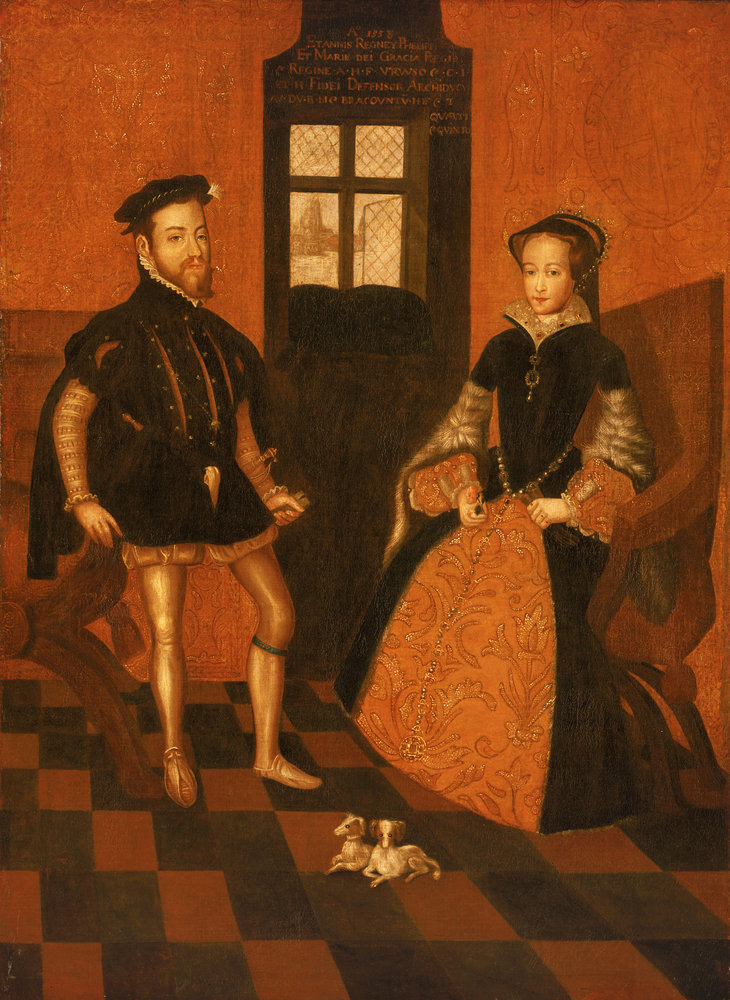 Philipp II. von Spanien und seine zweite Gemahlin Maria Tudor, Königin von England